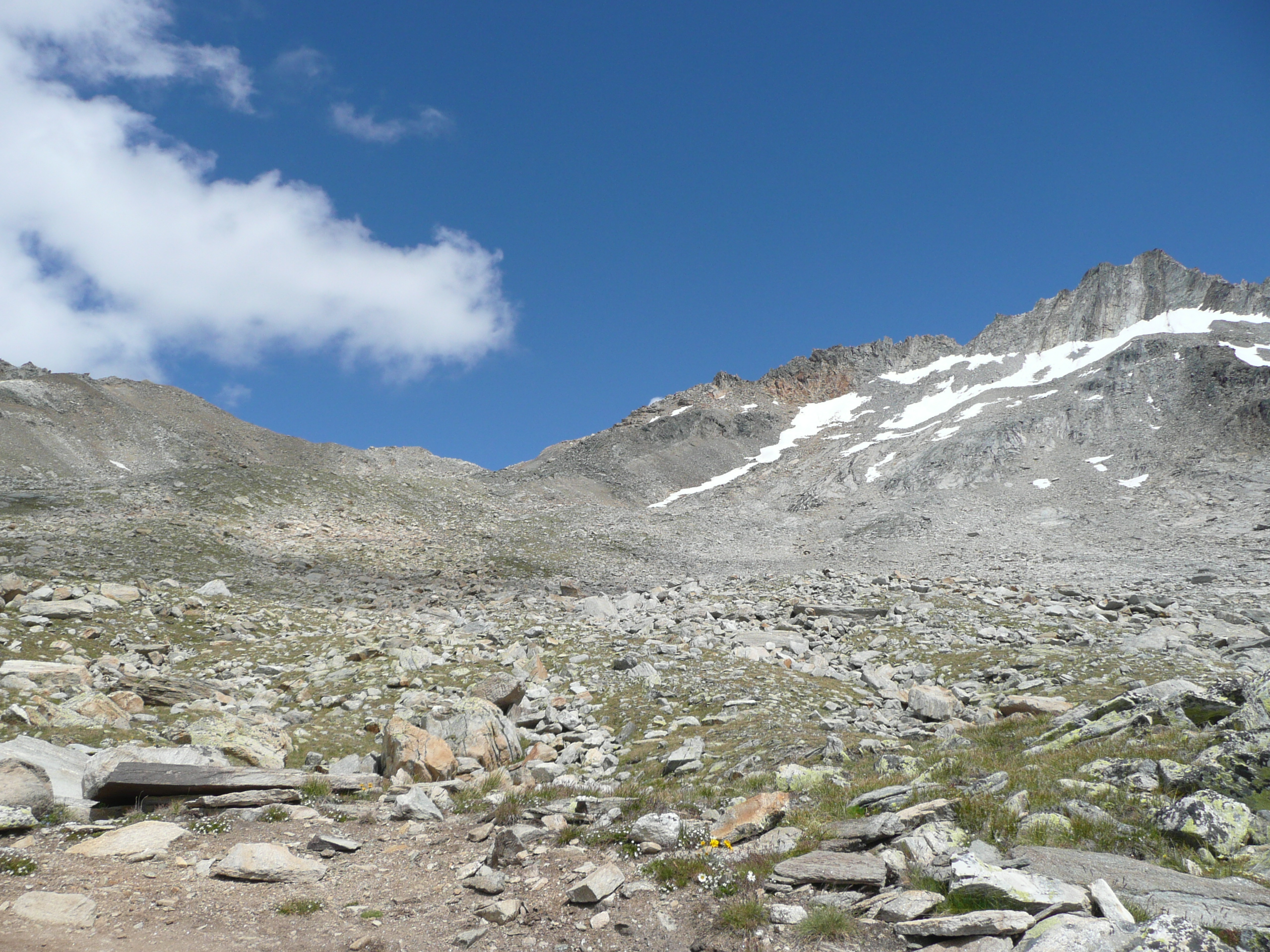 Blick von oberhalb der Almagellerhütte auf den Zwischbergenpass.